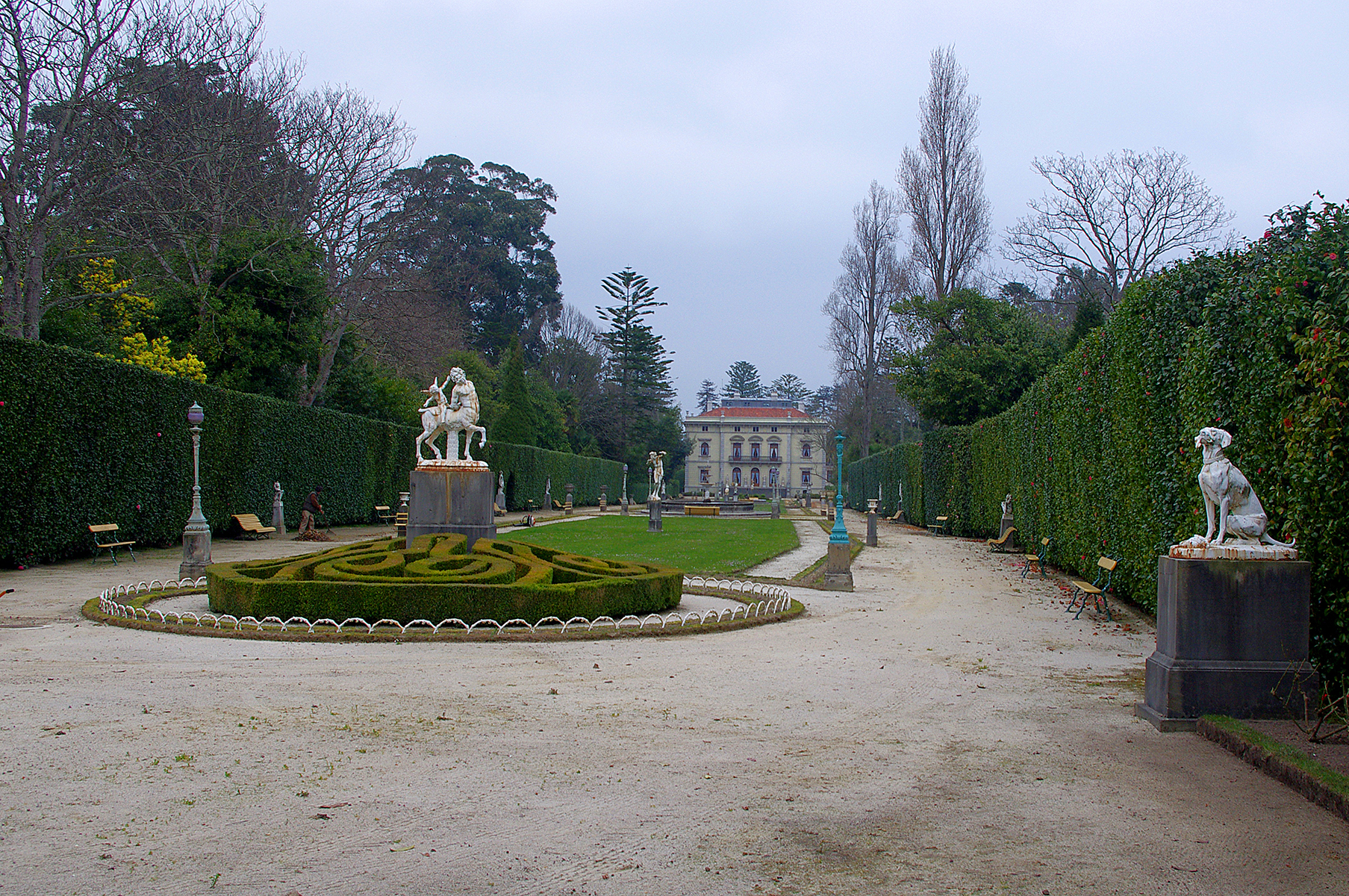 Entrada a los jardines de La Quinta de Selgas, un conjunto de palacio y finca ajardinada situado en El Pito (Asturias)